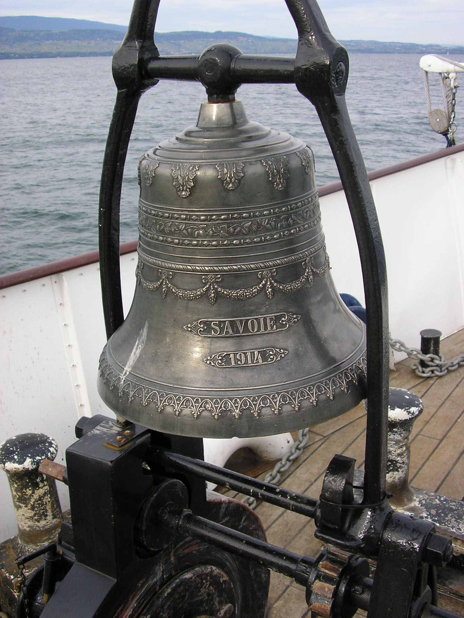 Cloche de la Savoie, bateau de la Compagnie générale de navigation sur le lac Léman (CGN)